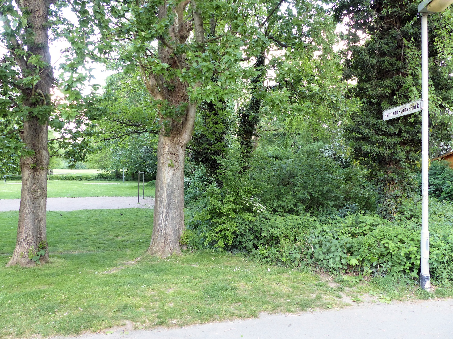 Westliches Ende des Hermann-Löns-Parks in Braunschweig-Südstadt.